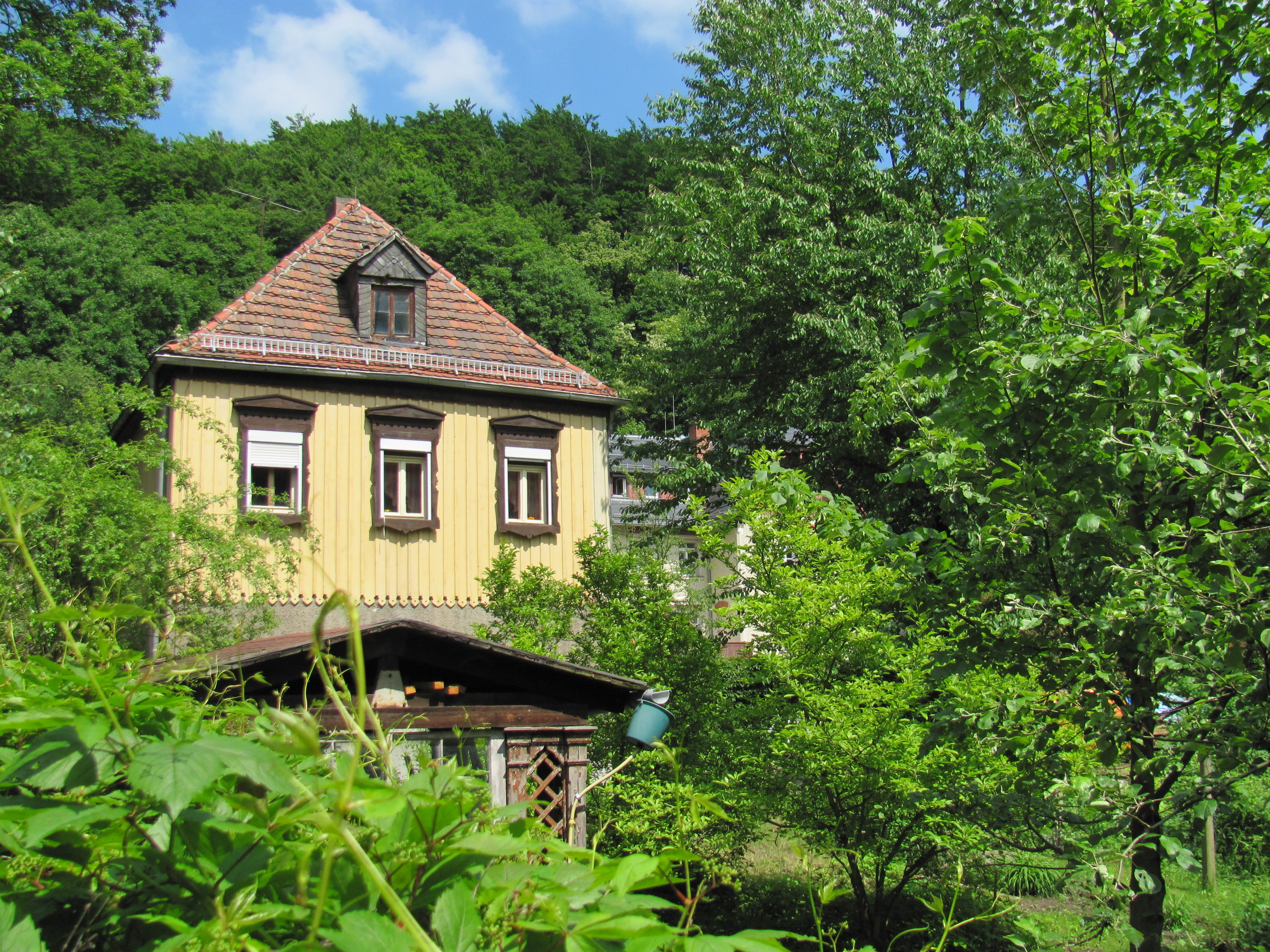 Radebeul Wohnhaus Braun-Brown